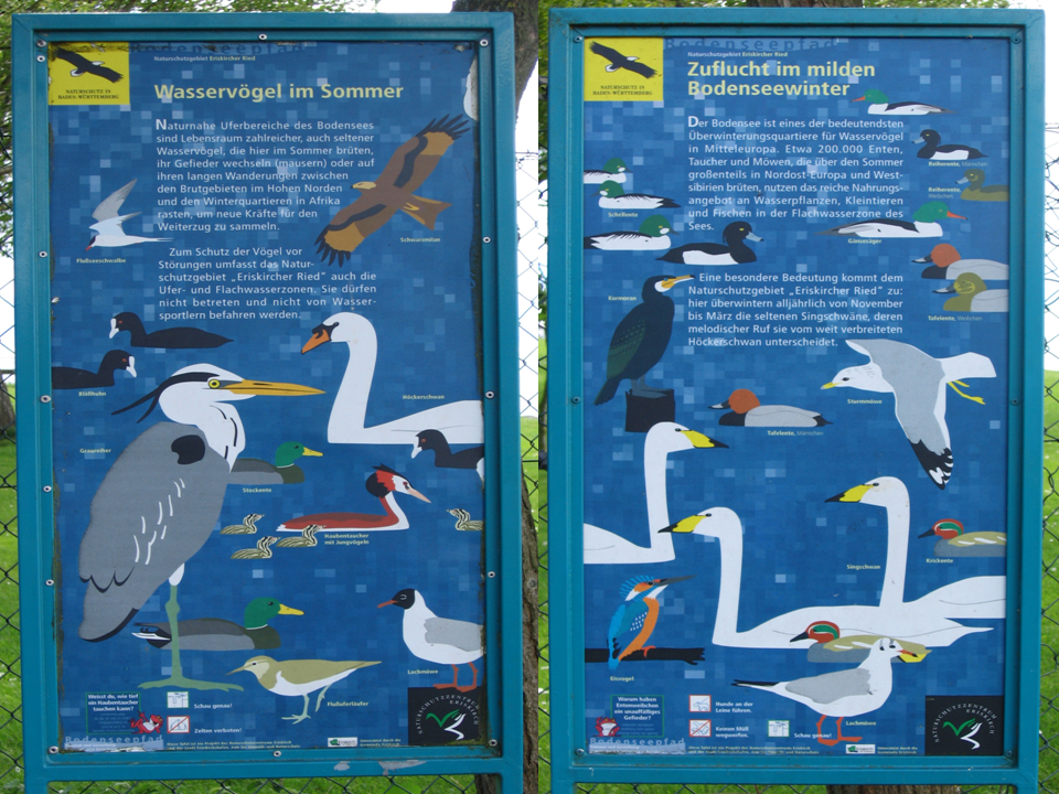 Deutschland - Baden-Württemberg - Bodenseekreis - Eriskirch: Eriskircher Ried, Übersichtstafeln "Vögel"